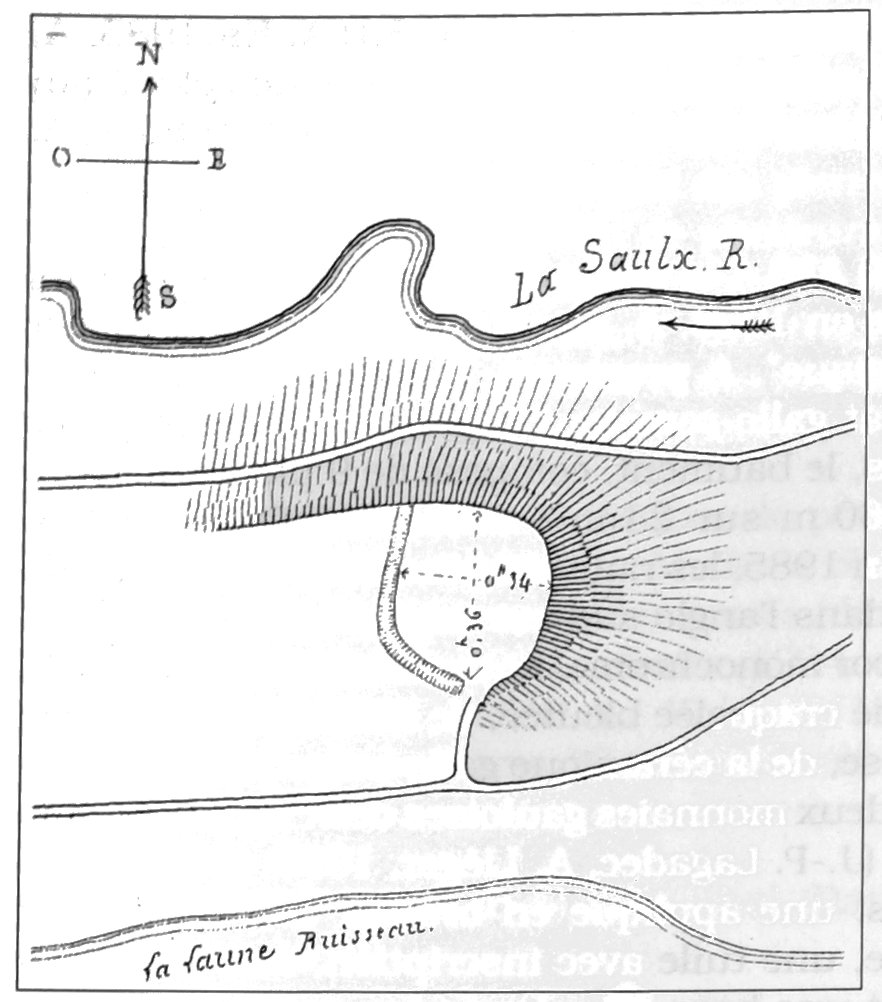 relevé de fouilles anciennes.